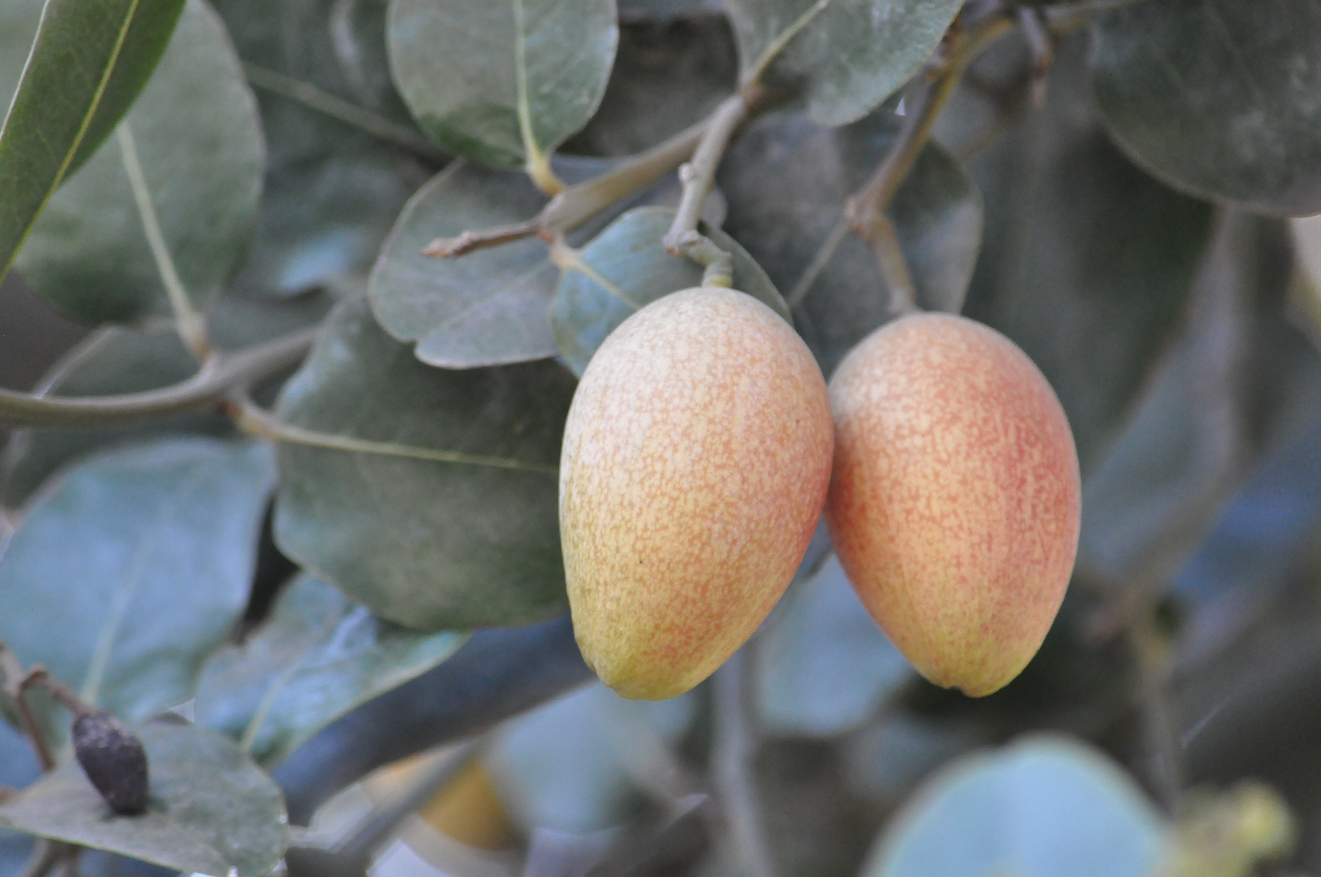 Belloto del norte (Beilschmiedia miersii). Árbol nativo de Chile. frutos maduros